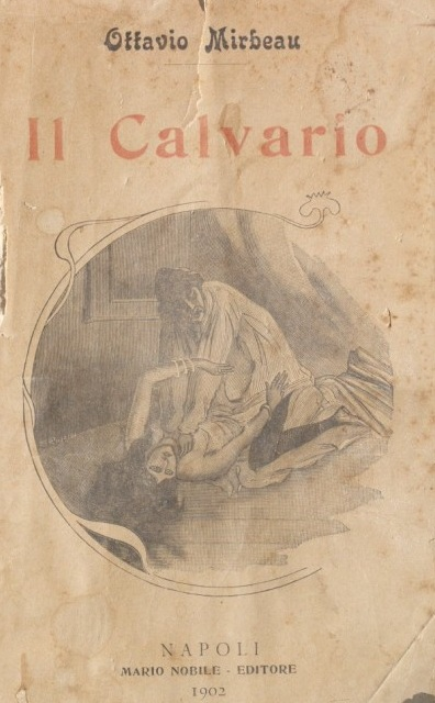 Couverture de la traduction italienne du "Calvaire", roman d'Octave Mirbeau (1848-1917) : "Il Calvario", Mario Nobile, Napoli, 1902. Le dessin de la couverture est de Georges Jeanniot (1848-1934).